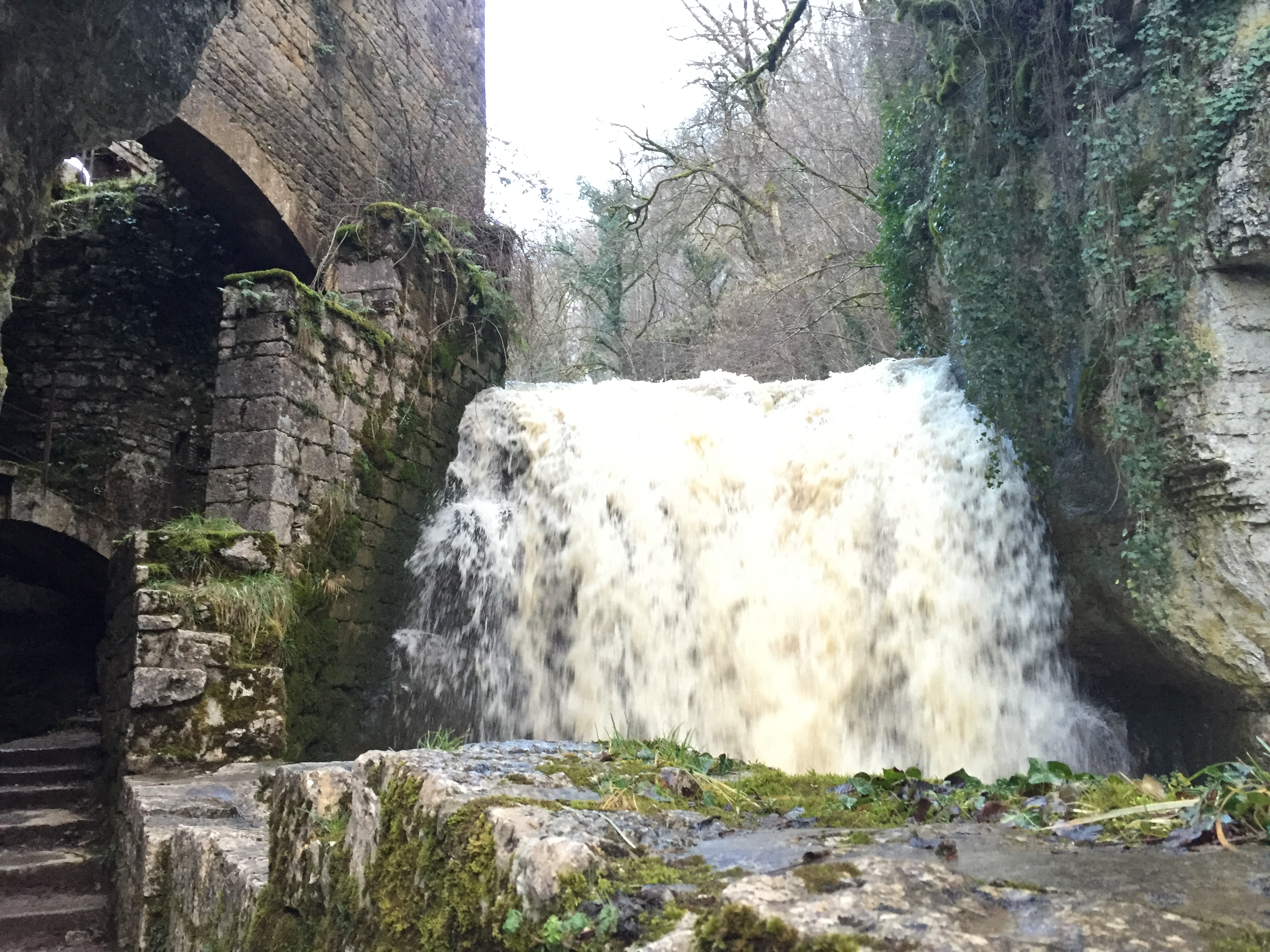 Cascade du Moulin du Saut sur l'Alzou (commune de Gramat)